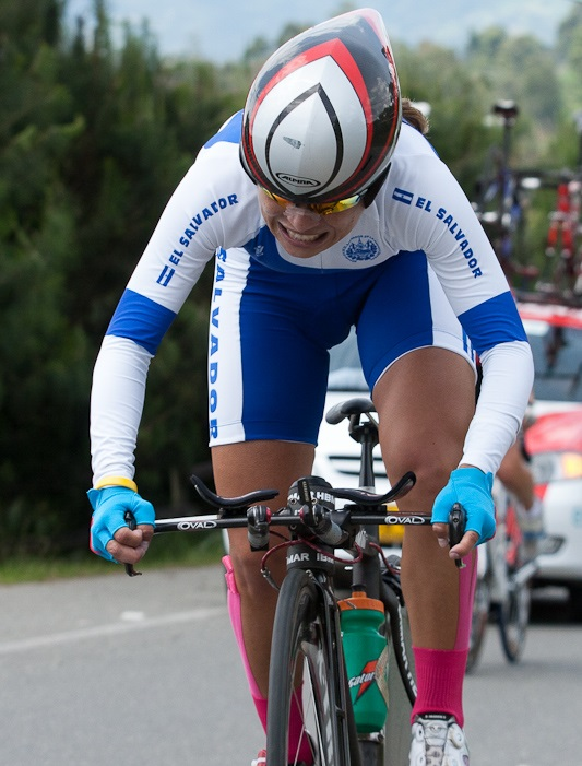 CRI. Campeonato Panamericano de Ciclismo de Ruta. Medellín. 6 de mayo de 2011.